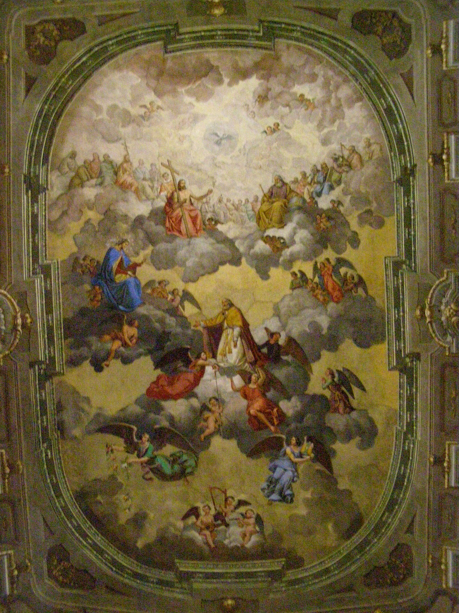 Stropná freska v lodi, dielo janovského maliara Luigiho Sacca z roku 1867